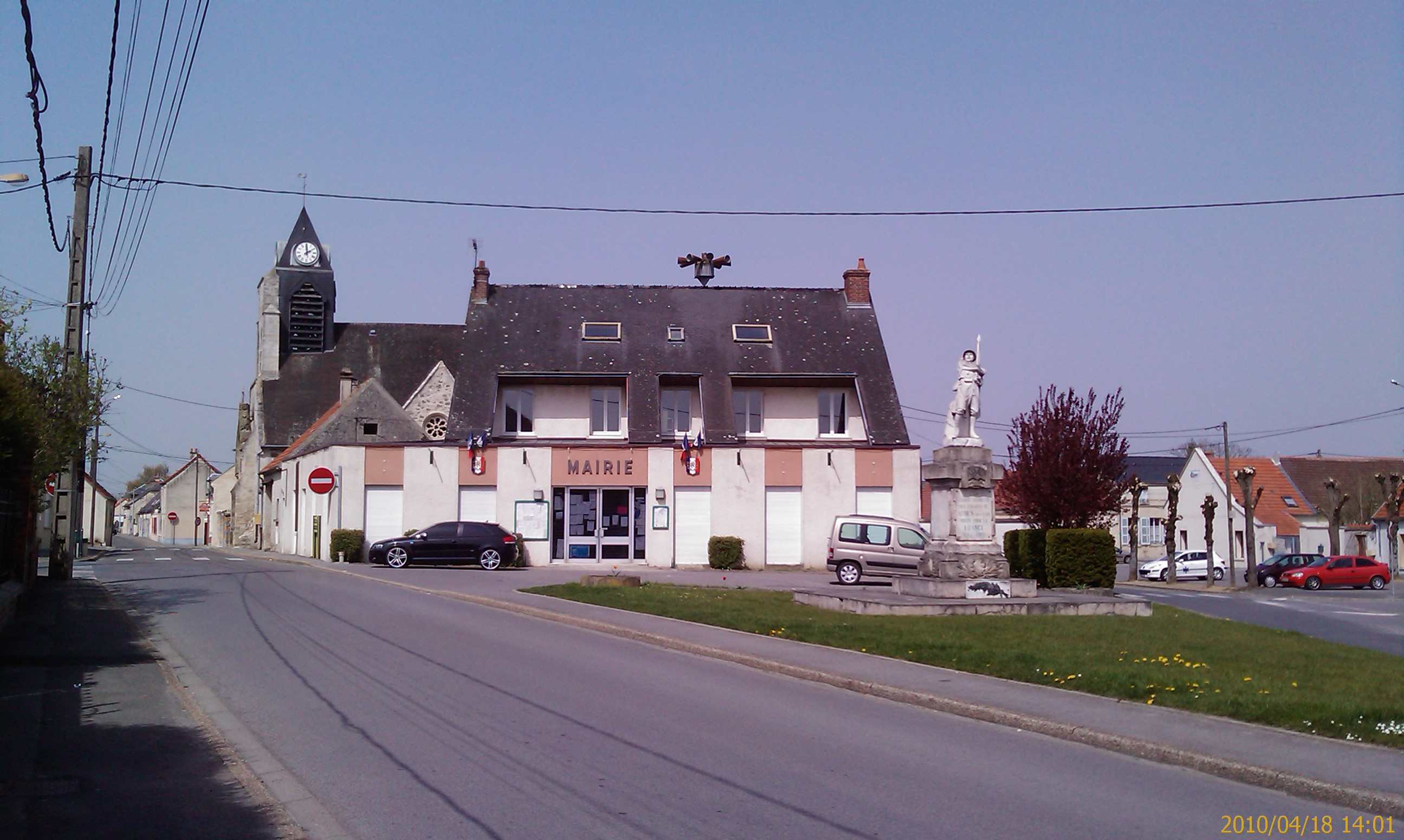 MAIRIE d'Athies-sous-Laon